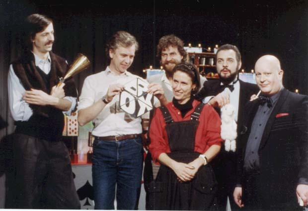 Das Team zur Sendung Die Kunst der Täuschung